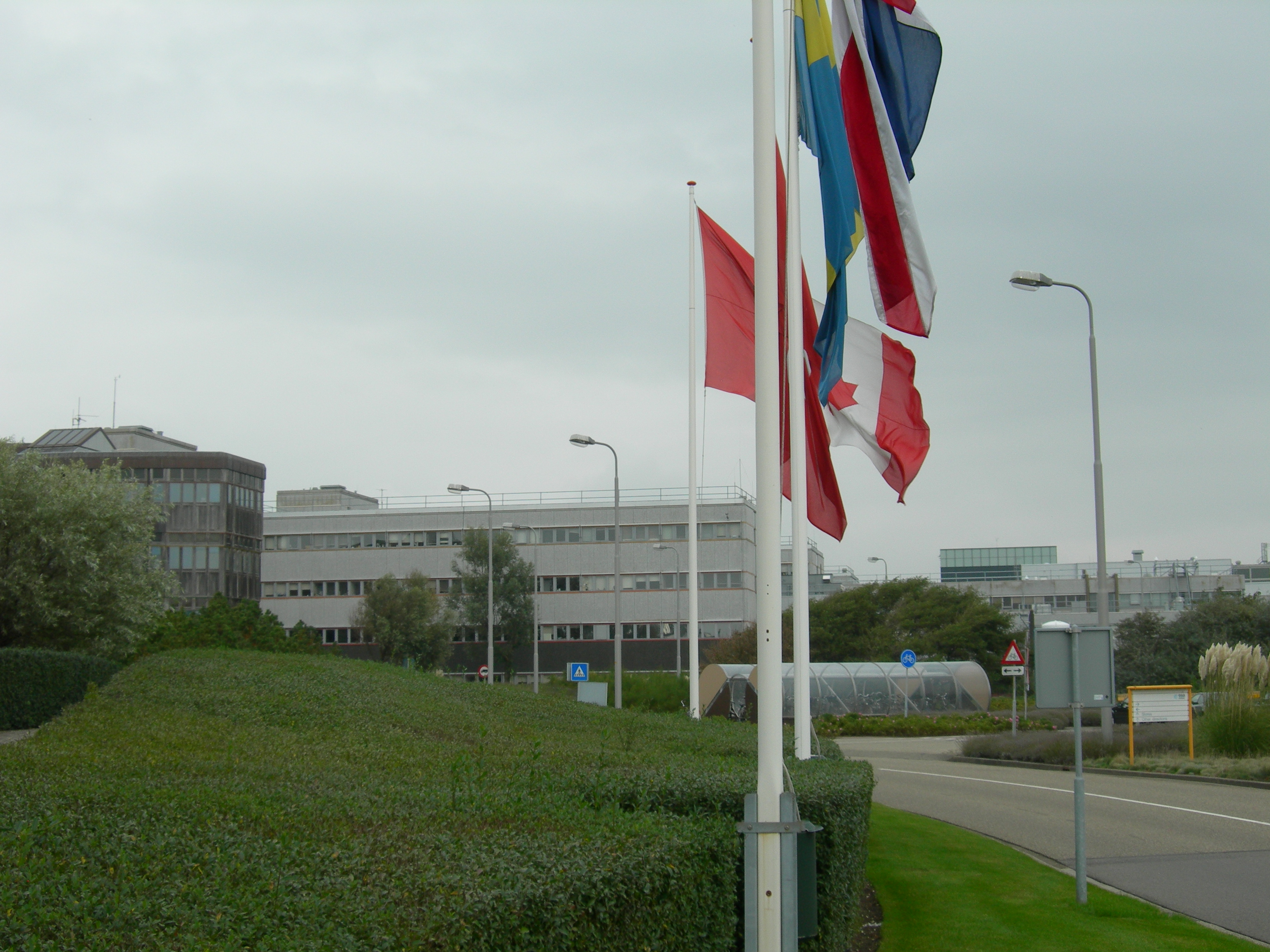 ESA-ESTEC